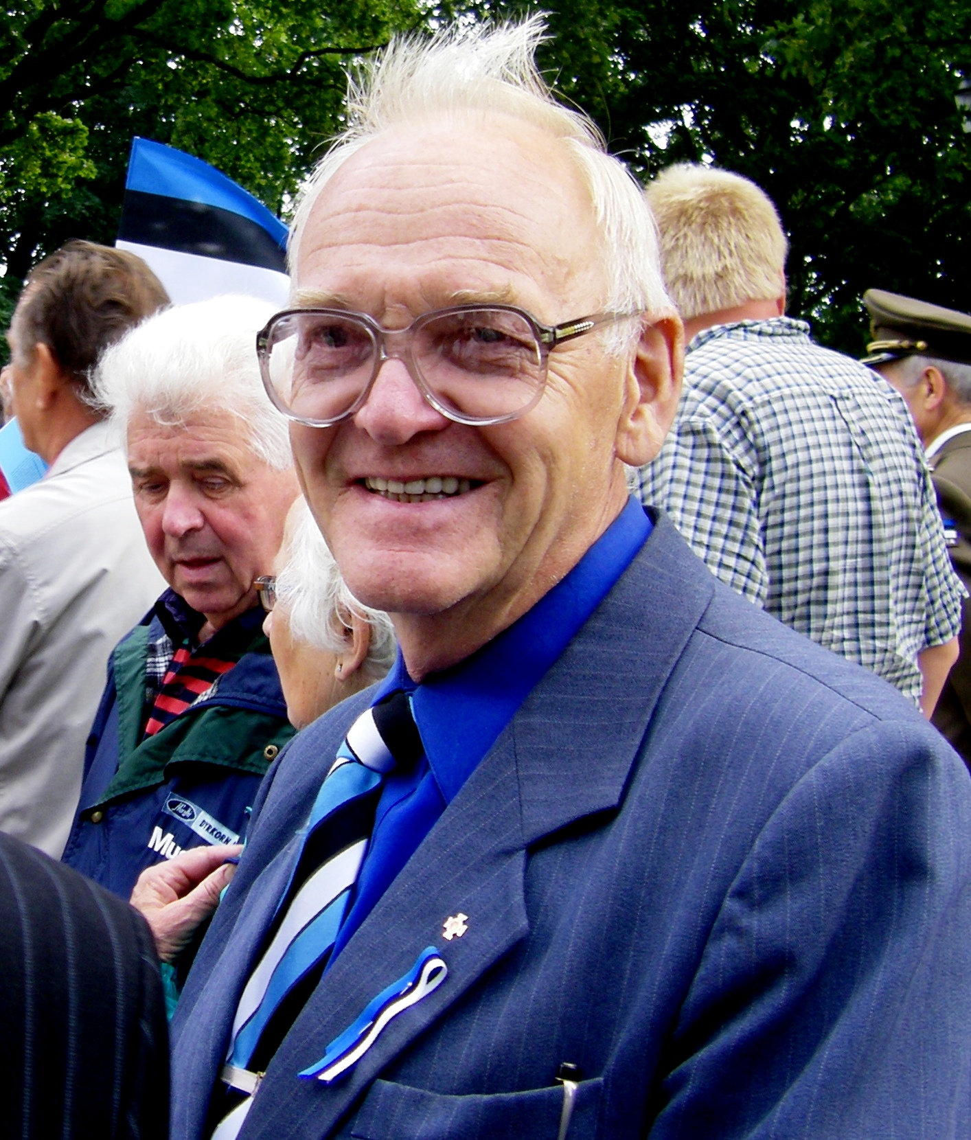 Jaan Lippmaa